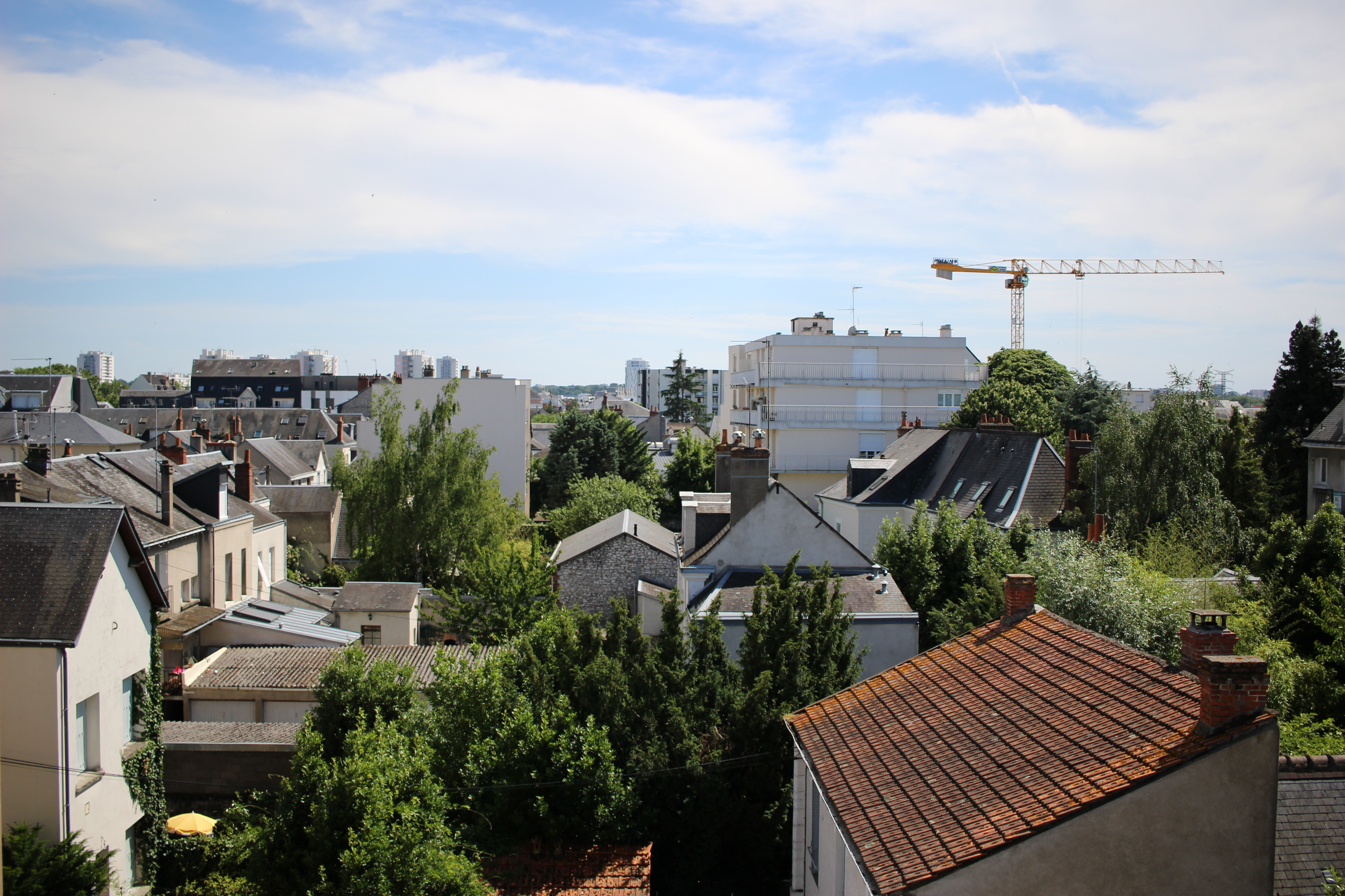 Une vue du Sud de Tours depuis le quartier des prébendes, en montant sur un toit.